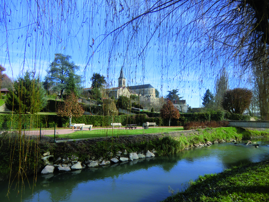 Square du Gué Vincent